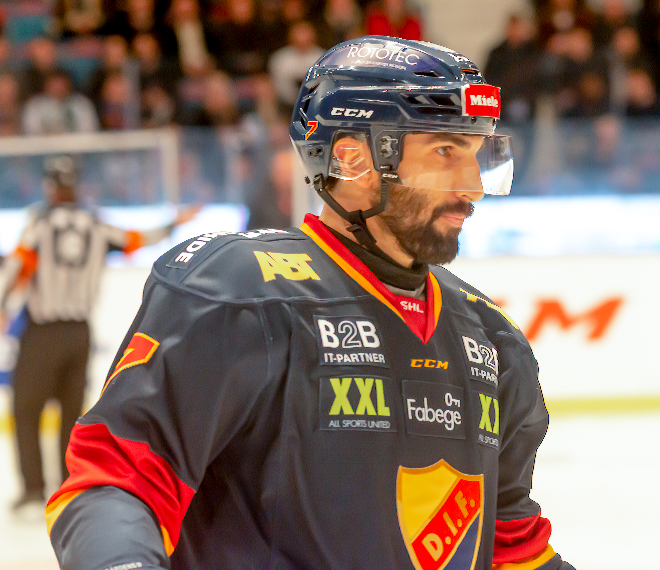 Djurgården-Färjestad 20190129